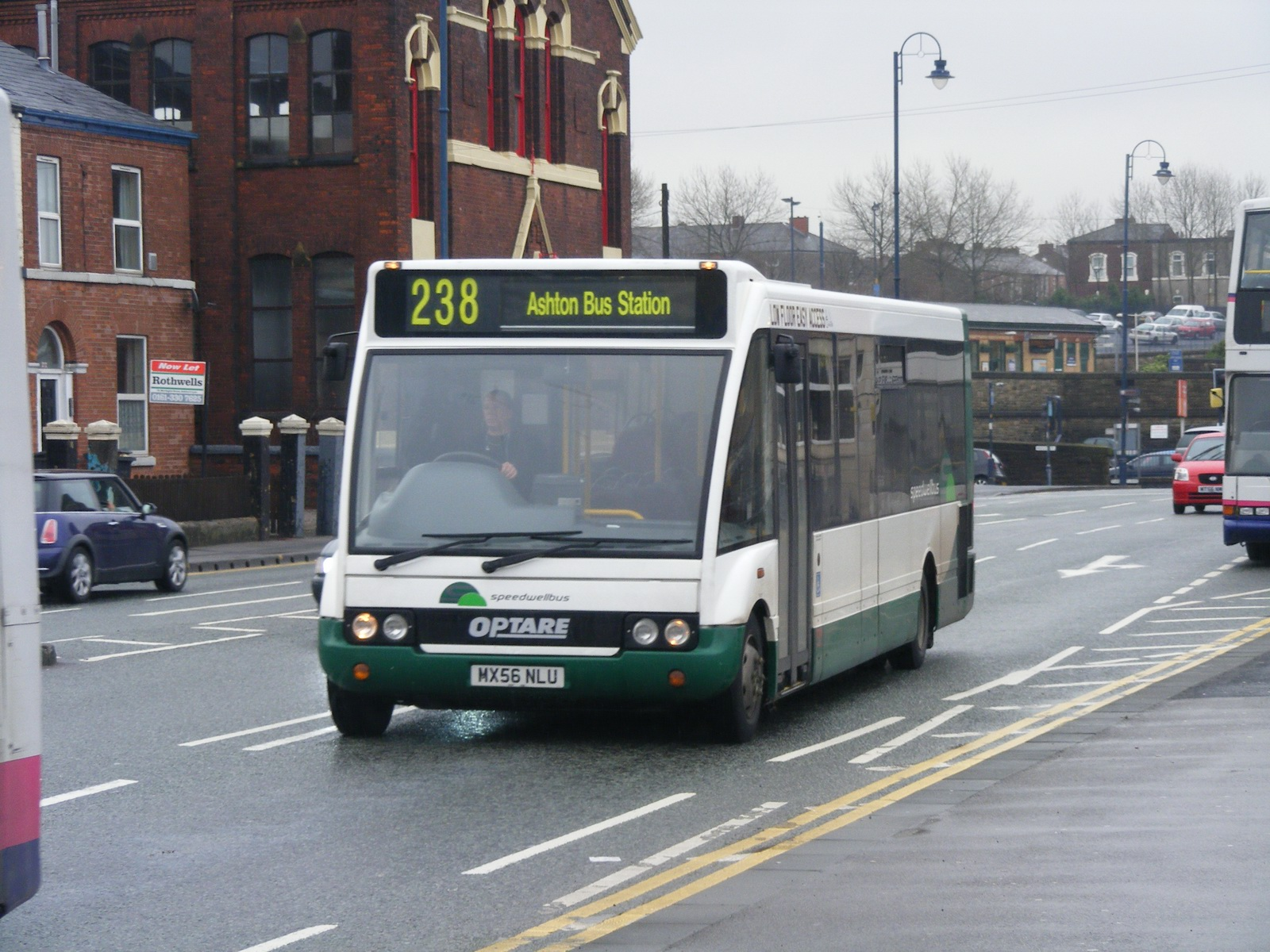 Speedwell MX56NLU Ashton-under-Lyne